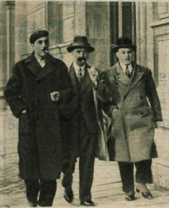 Police Magazine commente le 23 décembre 1934 la libération de l'inspecteur Bonny : "L'inspecteur Bonny a été mis en liberté provisoire, ce qui n'a pas manqué de surprendre nombre de gens. l'inspecteur de police, dont les dernières dépositions, tant devant le juge que devant la Commission d'enquête, avaient été marquées par une totale discrétion, quitte le Quai-des-Orfèvres (en bérêt basque, à gauche)."